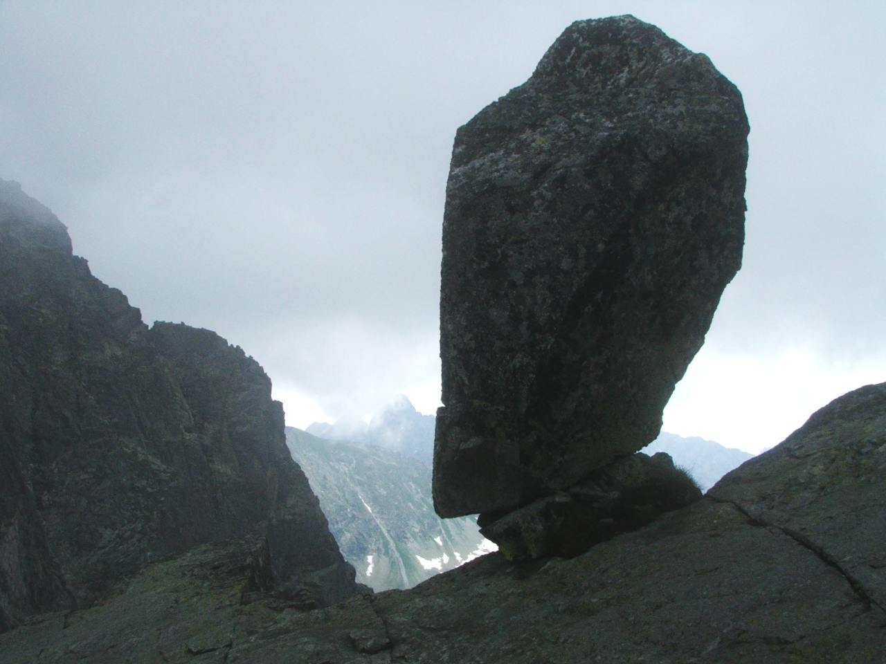 Skalna maczuga ("chłopek") w wschodnim siodle grani Zmarzłej Przełęczy